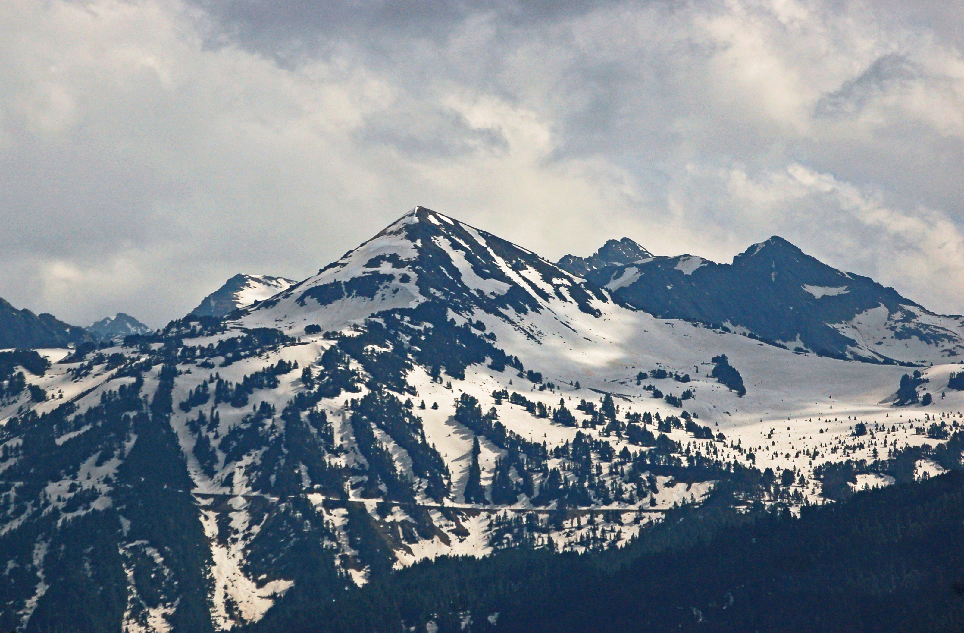 Cim del Salana a la Vall d´Aran, Naut Aran This is a a photo of a natural area in Catalonia, Spain, with id: ES510146